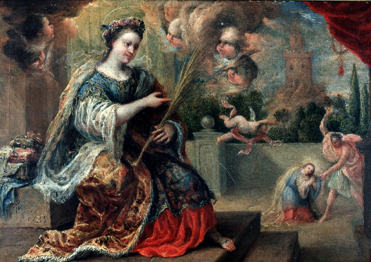 La obra representa a la mártir Santa Bárbara, que murió por profesar el cristianismo.